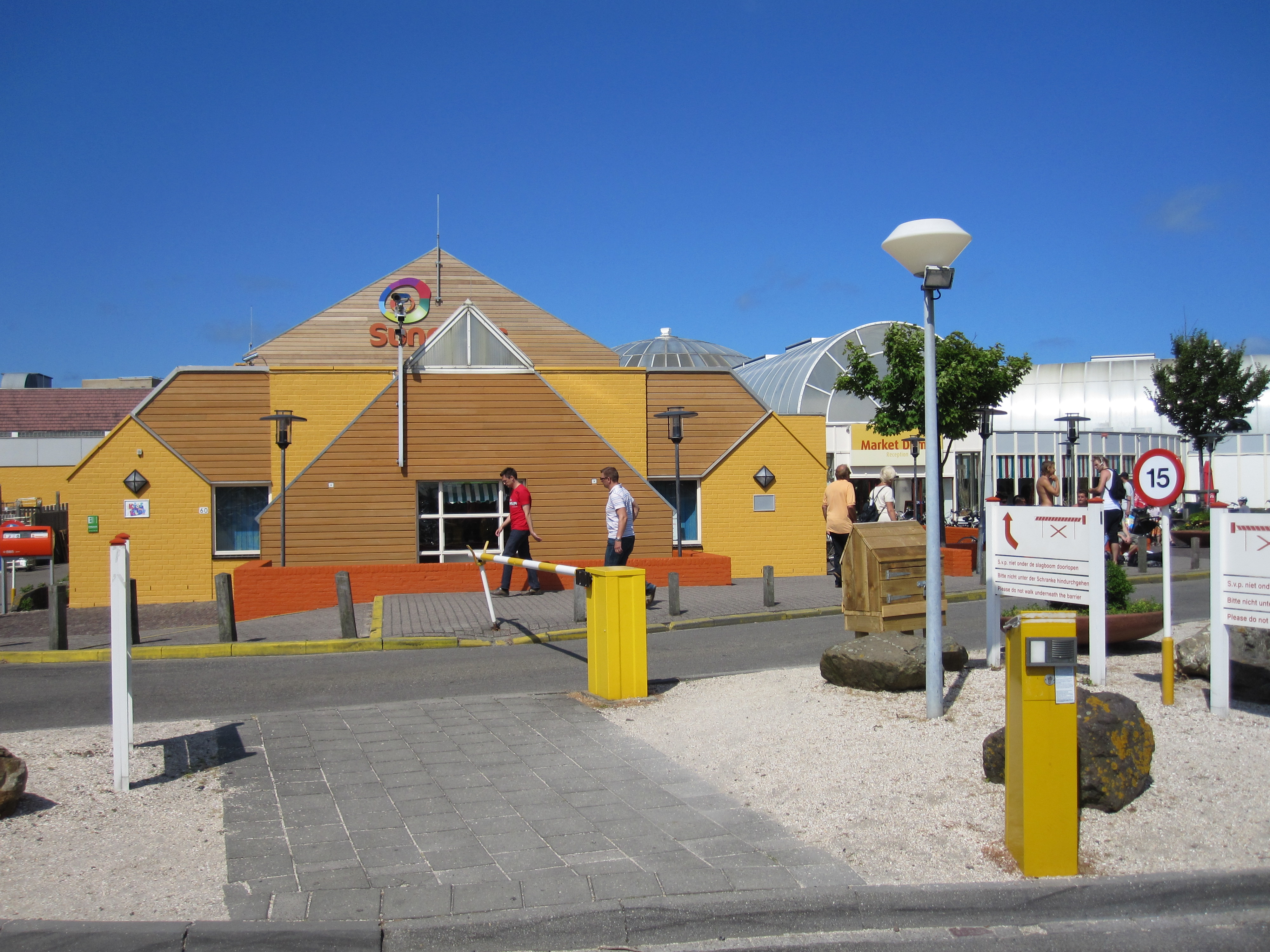 Eingang zum Sun Parcs